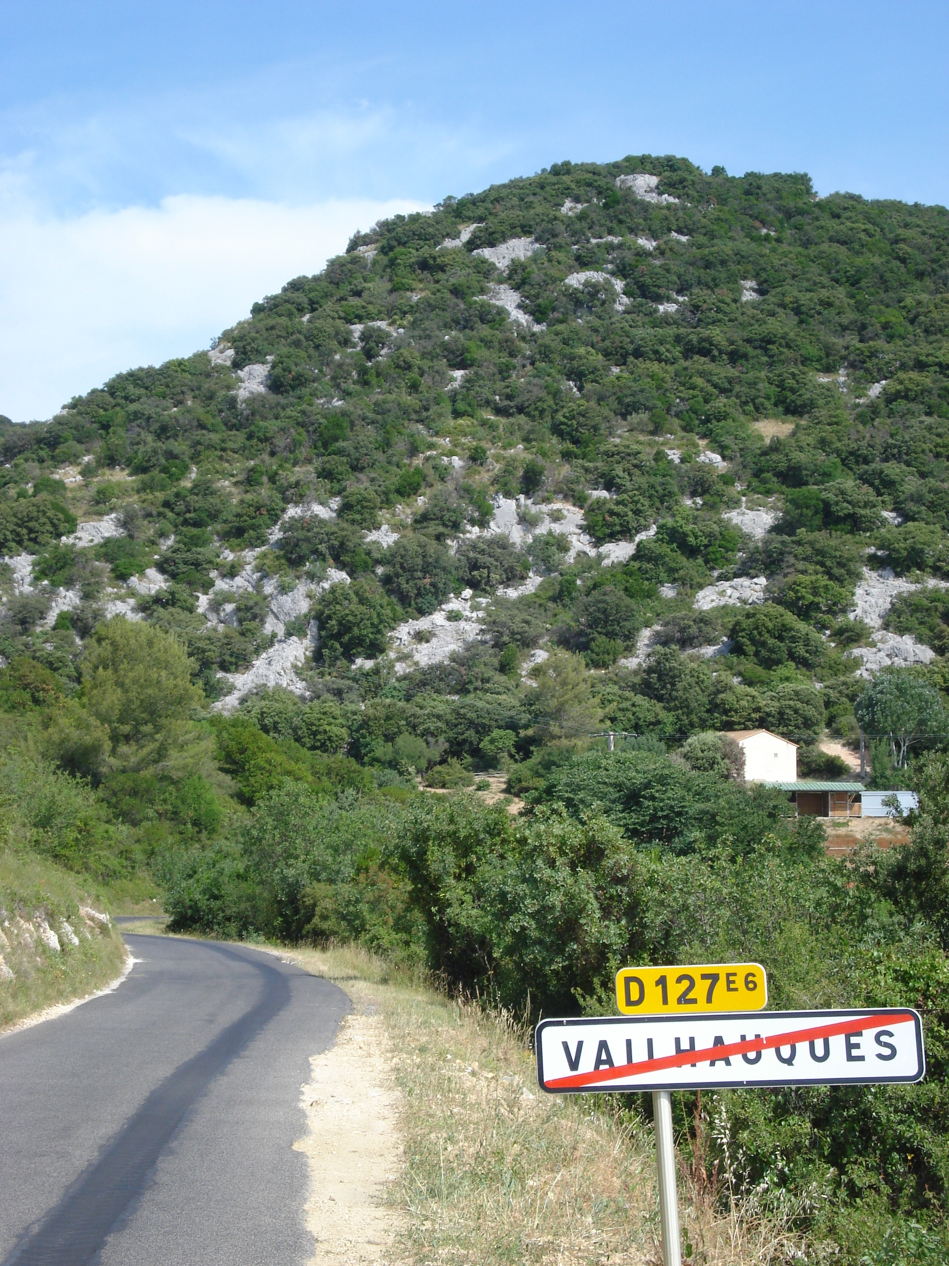 Vailhauquès, sorti nord, vue sur la garrigue.